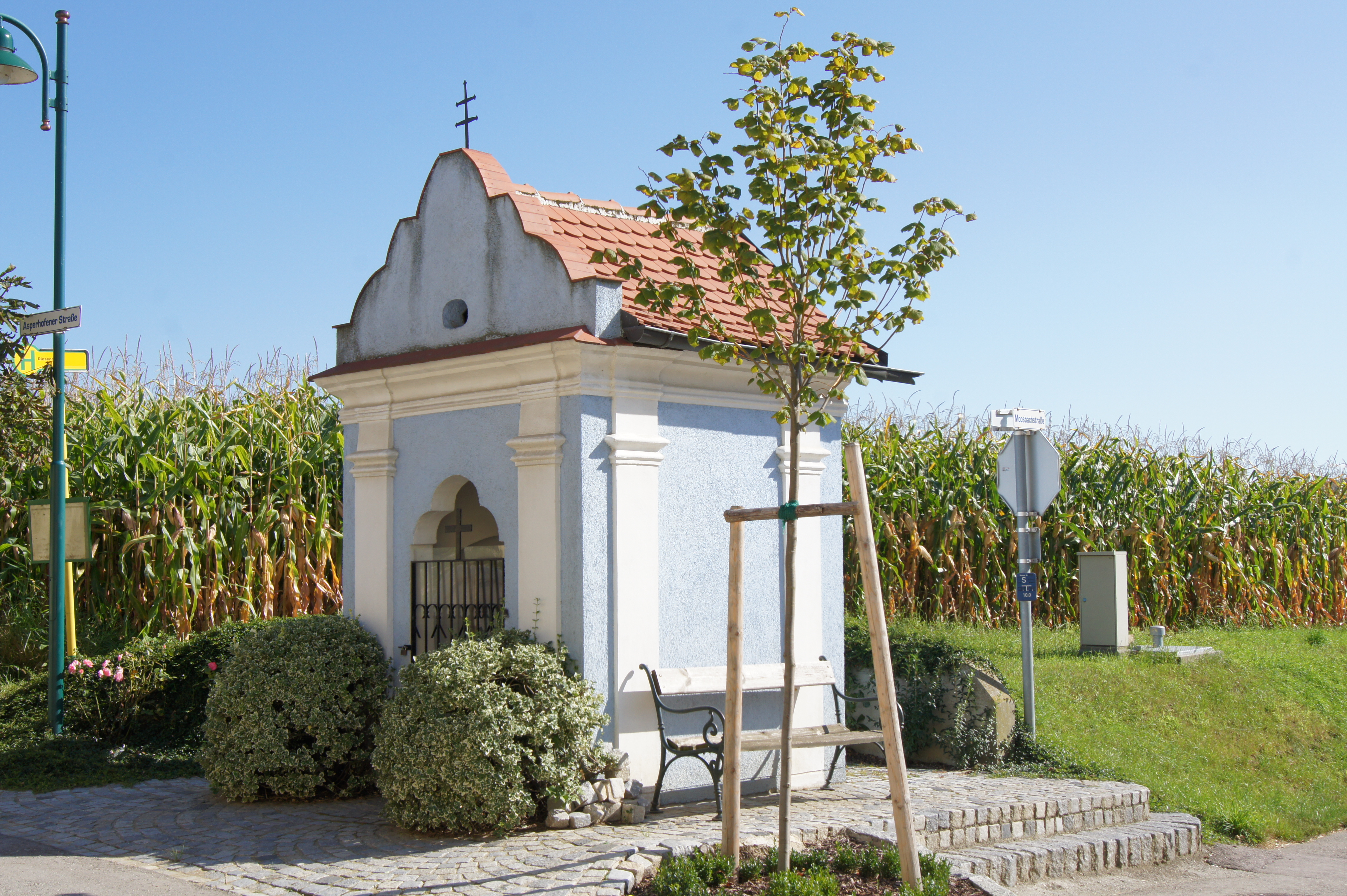 Flur-/Wegkapelle in Diesendorf